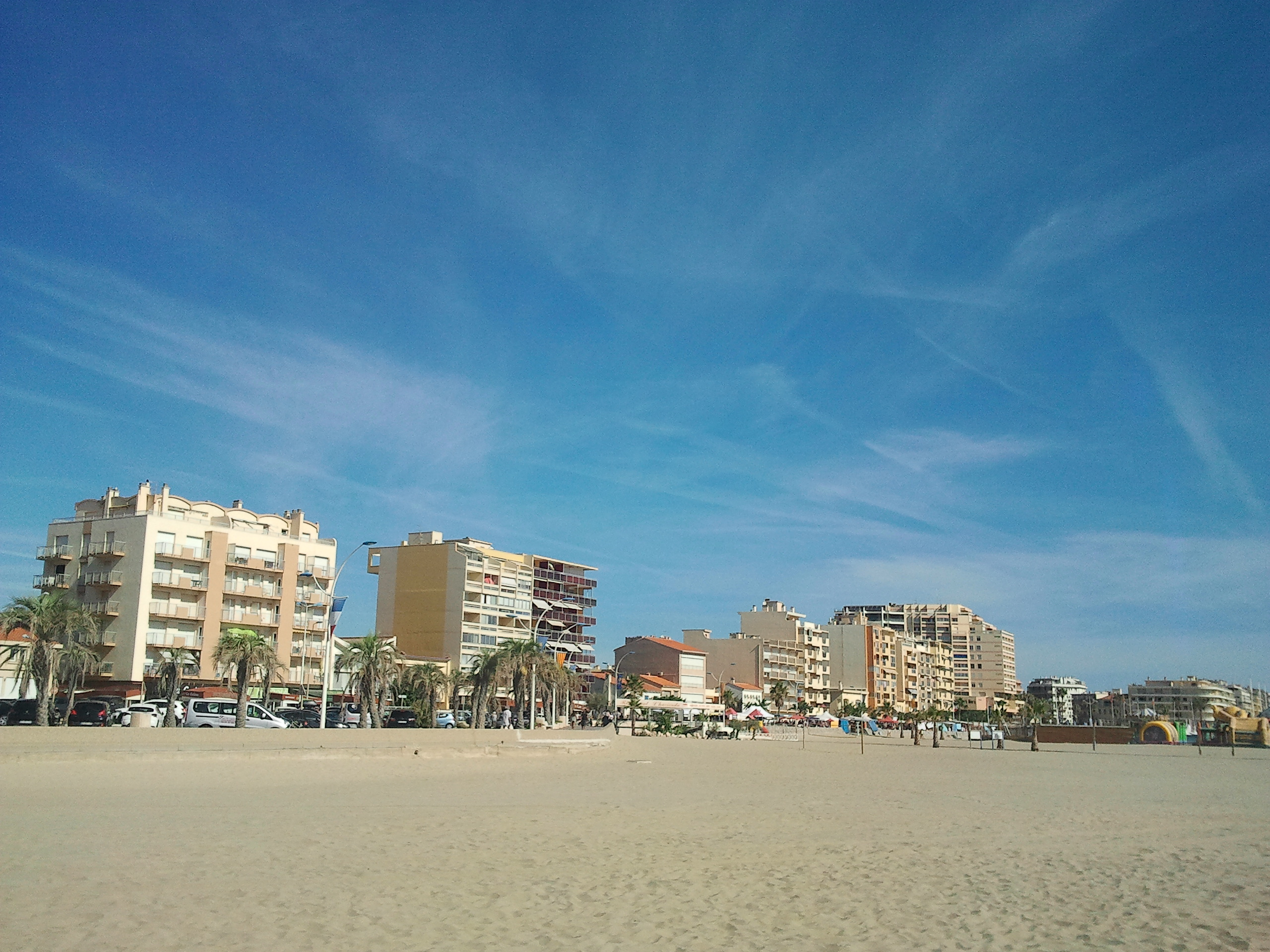 Le front de mer sur l'avenue Côte Vermeille à Canet-en-Roussillon